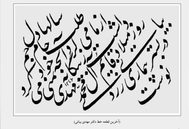 عکس از ایسنا وب آدرس